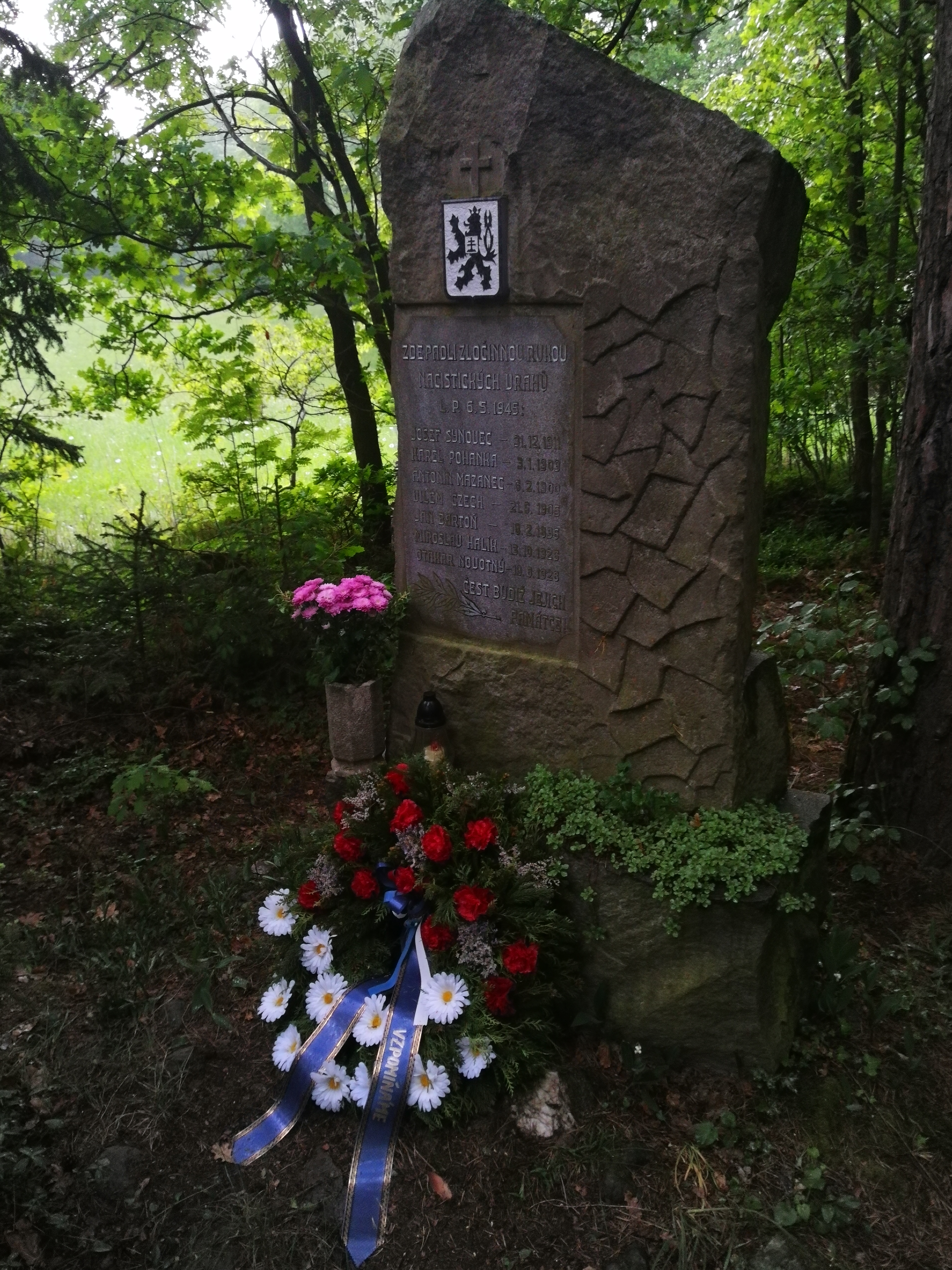 Jedouchov, pomník popravených 6.5.1945